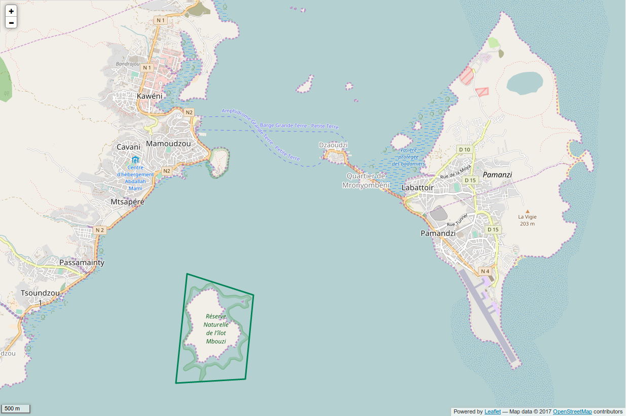 Périmètre de la RNN de l'Ilot Mbouzi.